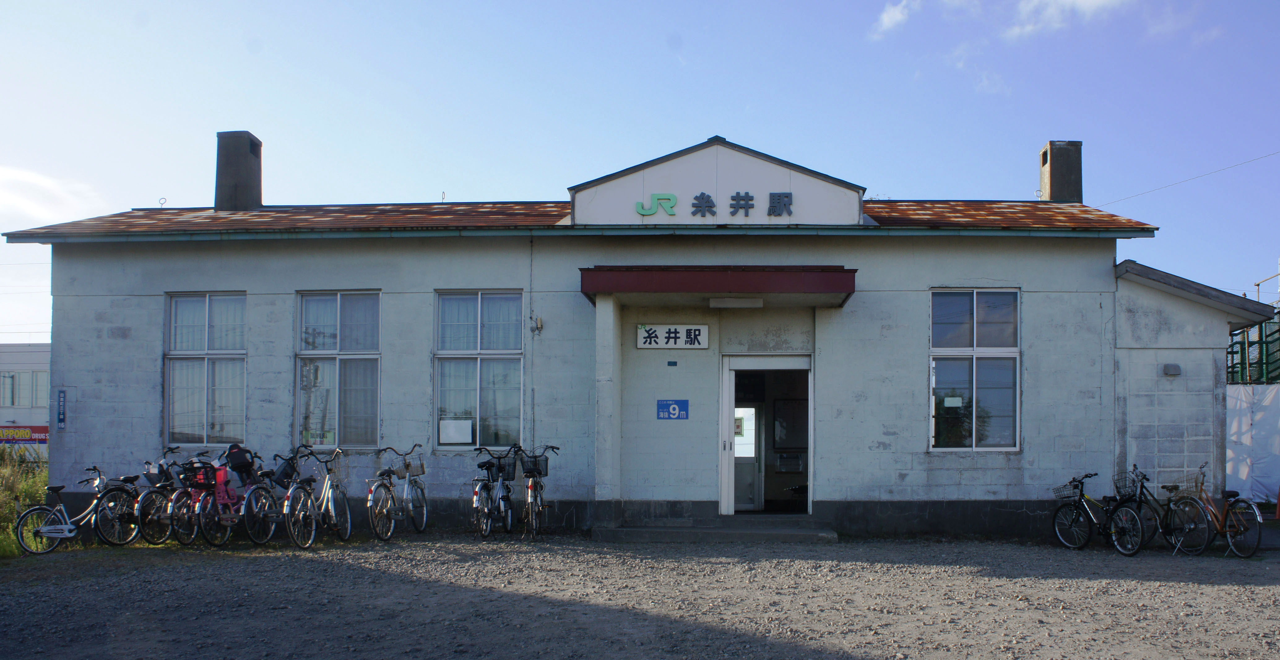 JR室蘭本線・糸井駅の駅舎